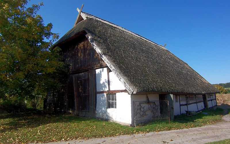 Scheune in Gessin